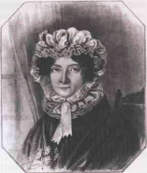 Екатерина Александровна Трубецкая, урожд. Мансурова (?)